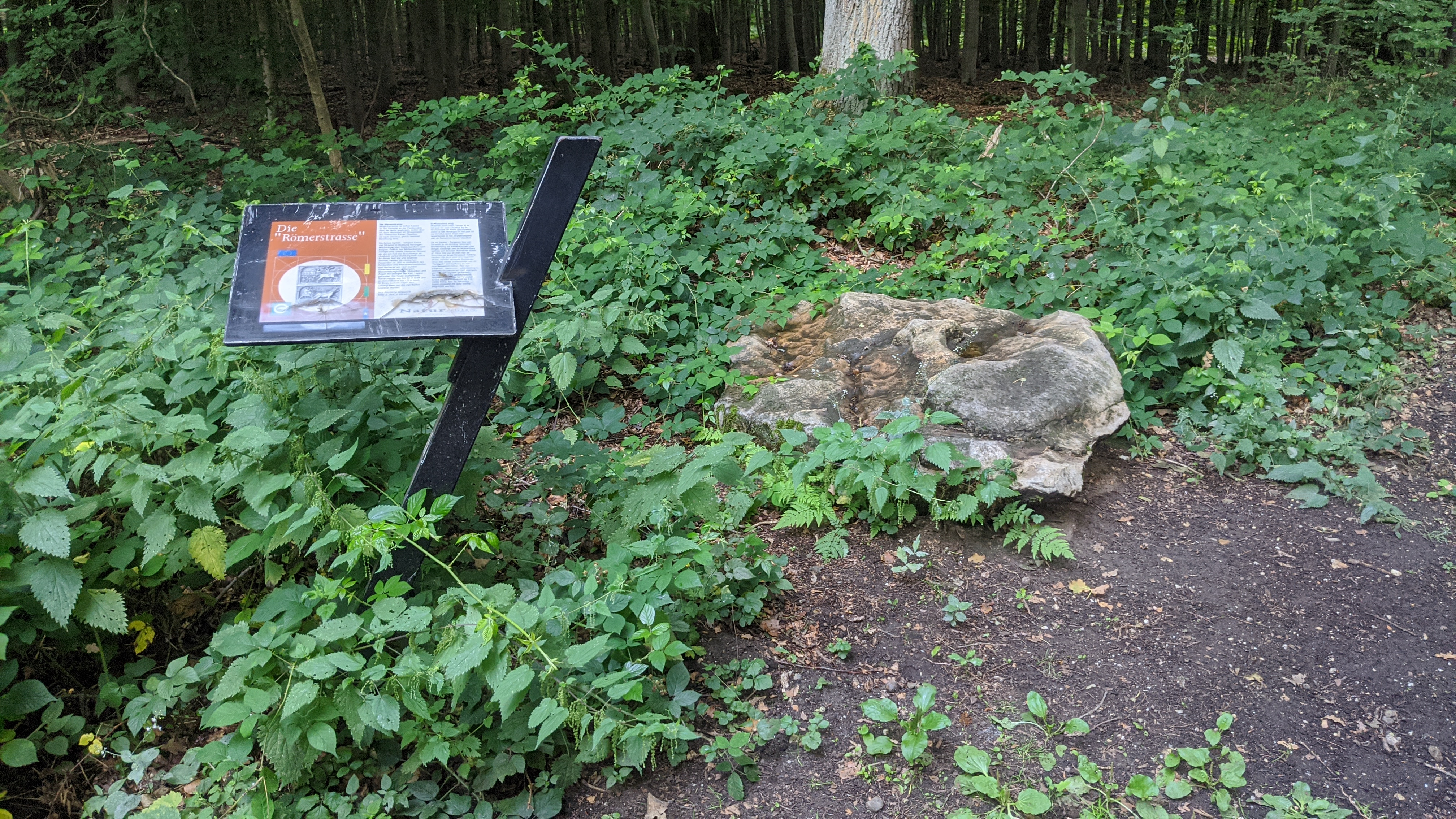 Teufelsstein Heronger Buschberge Denkmalnummer ND 30 Der Findling liegt neben einer Infotafel zu der dort verlaufenden ehemaligen Römerstraße